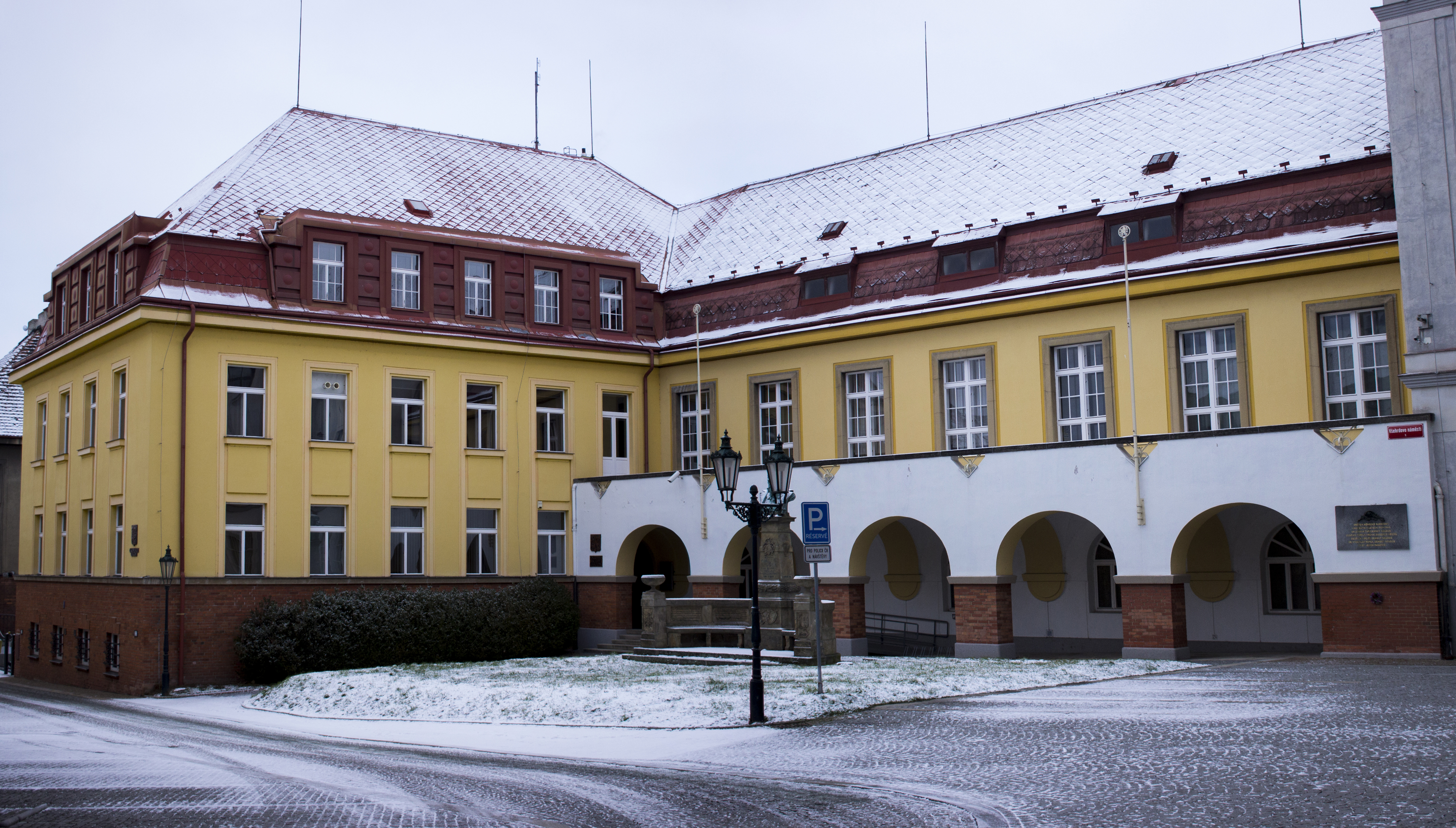 Fotografie okresního soudu v Chrudimi